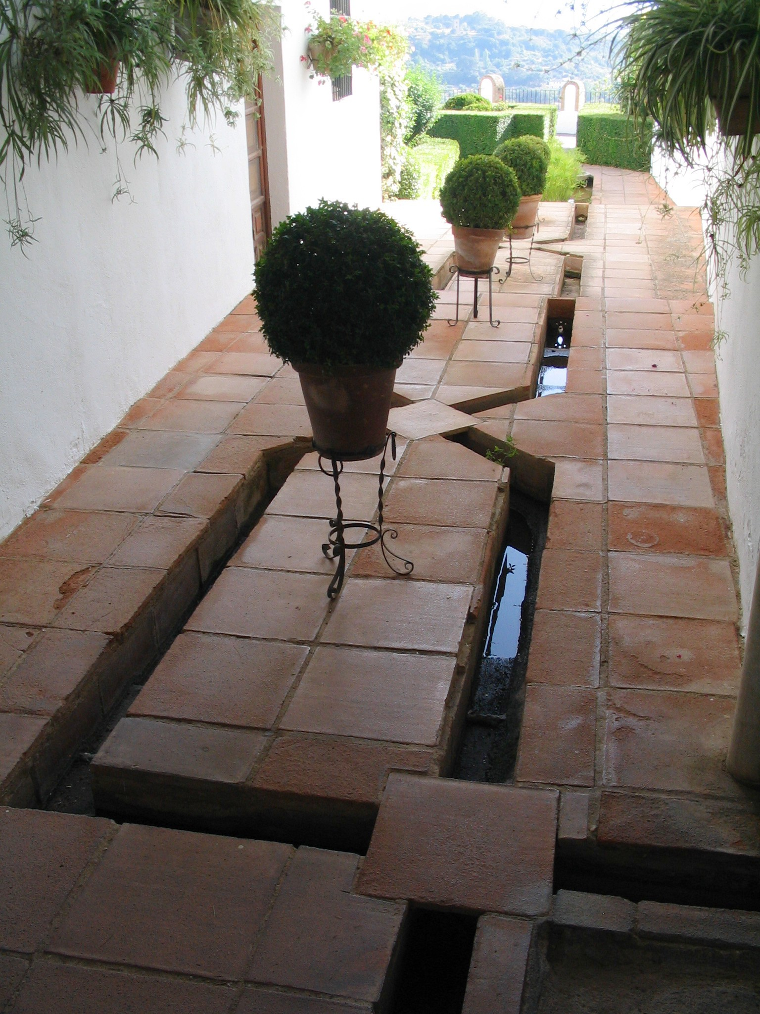 La géométrie des rigoles s’insère dans le pavage. Ronda, Espagne, Palacio de Mondragon. Espagne.